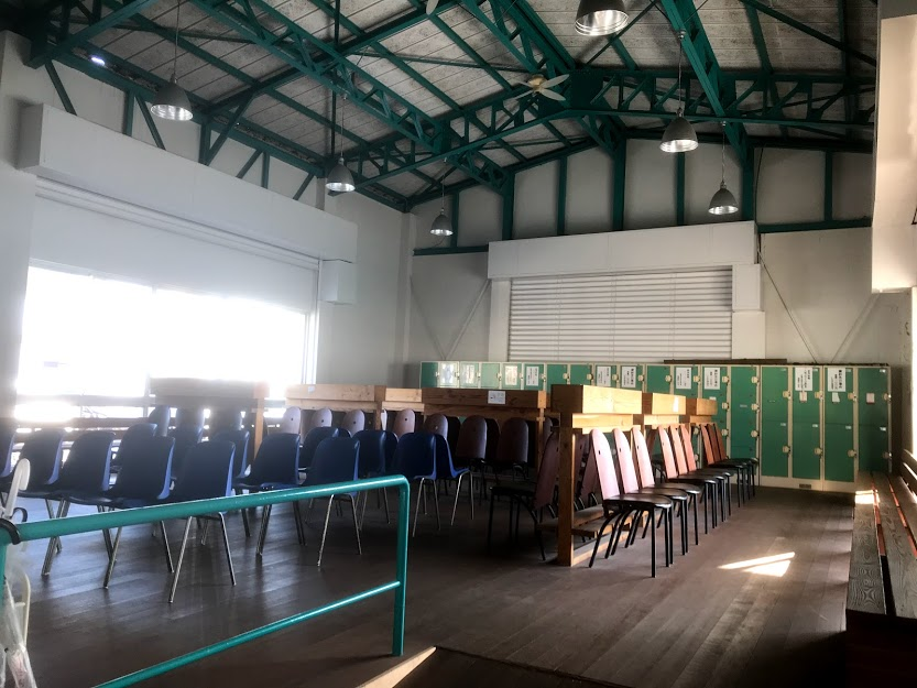 2019年4月12日撮影